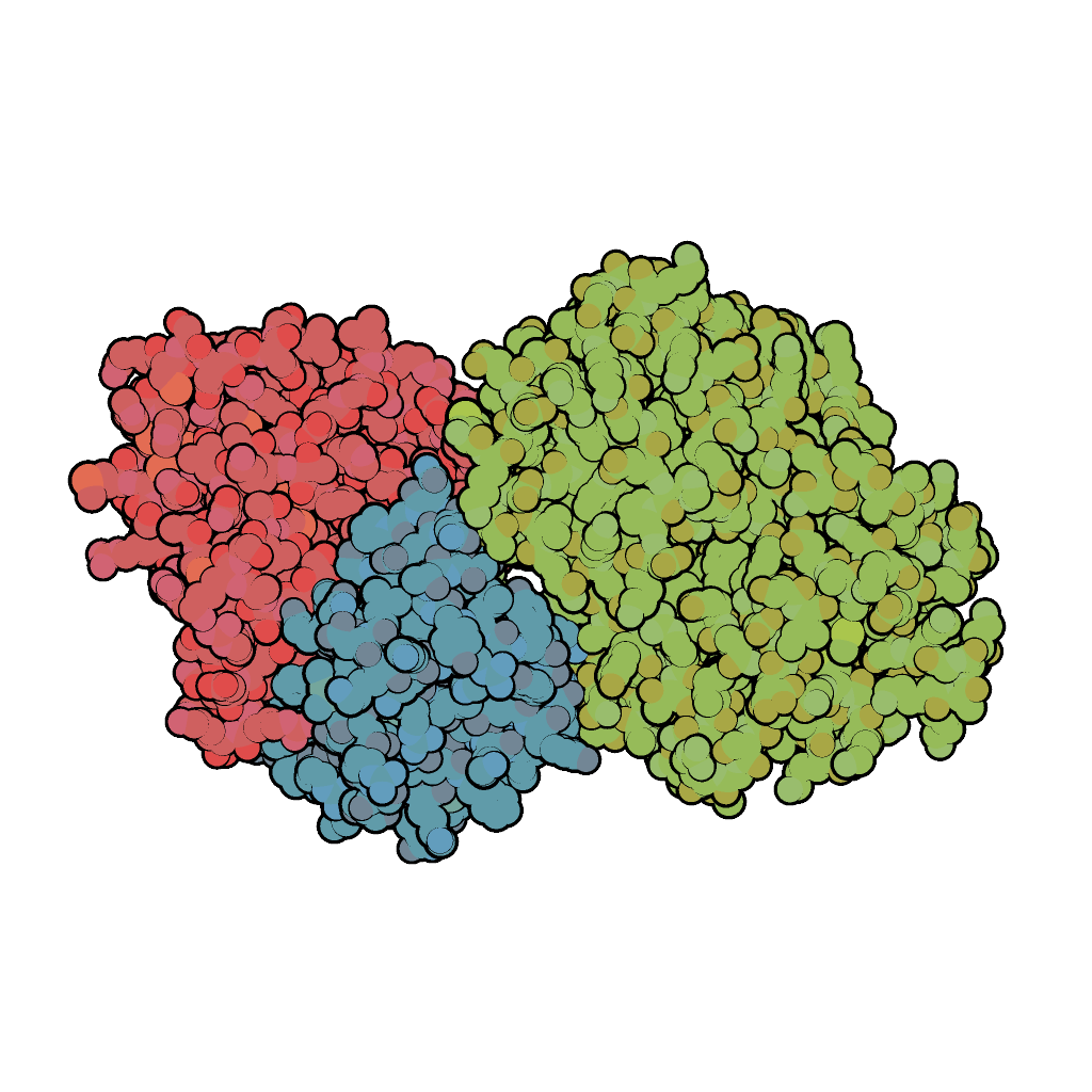 青:E6 赤:p53 緑:ユビキチンリガーゼ E6AP PDB ID : 4XR8 Qutemolを用いて描写